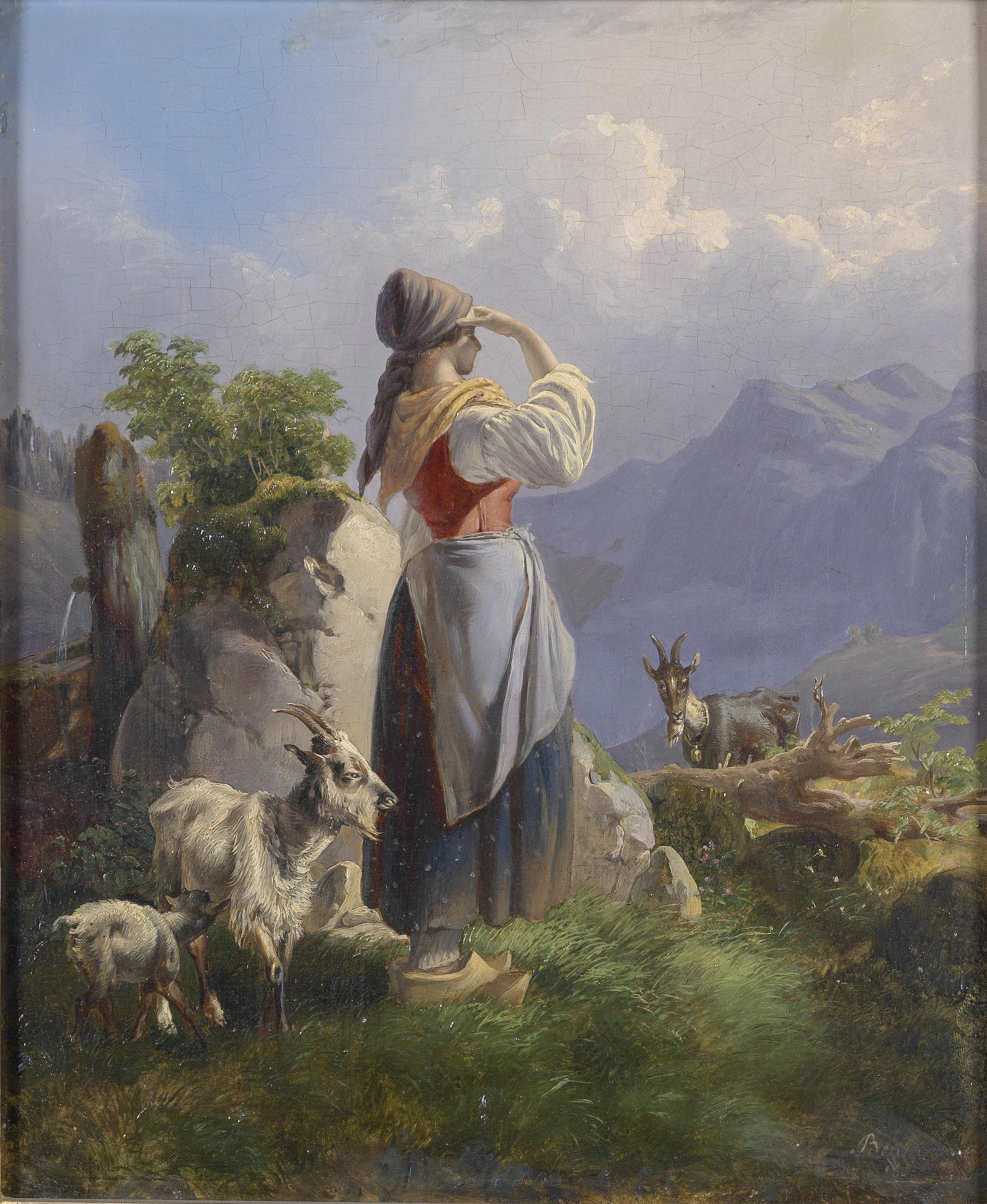 Blick ins Land, signiert, undeutlich datiert Benkert 18.., Öl auf Holz, 31 x 24,5 cm